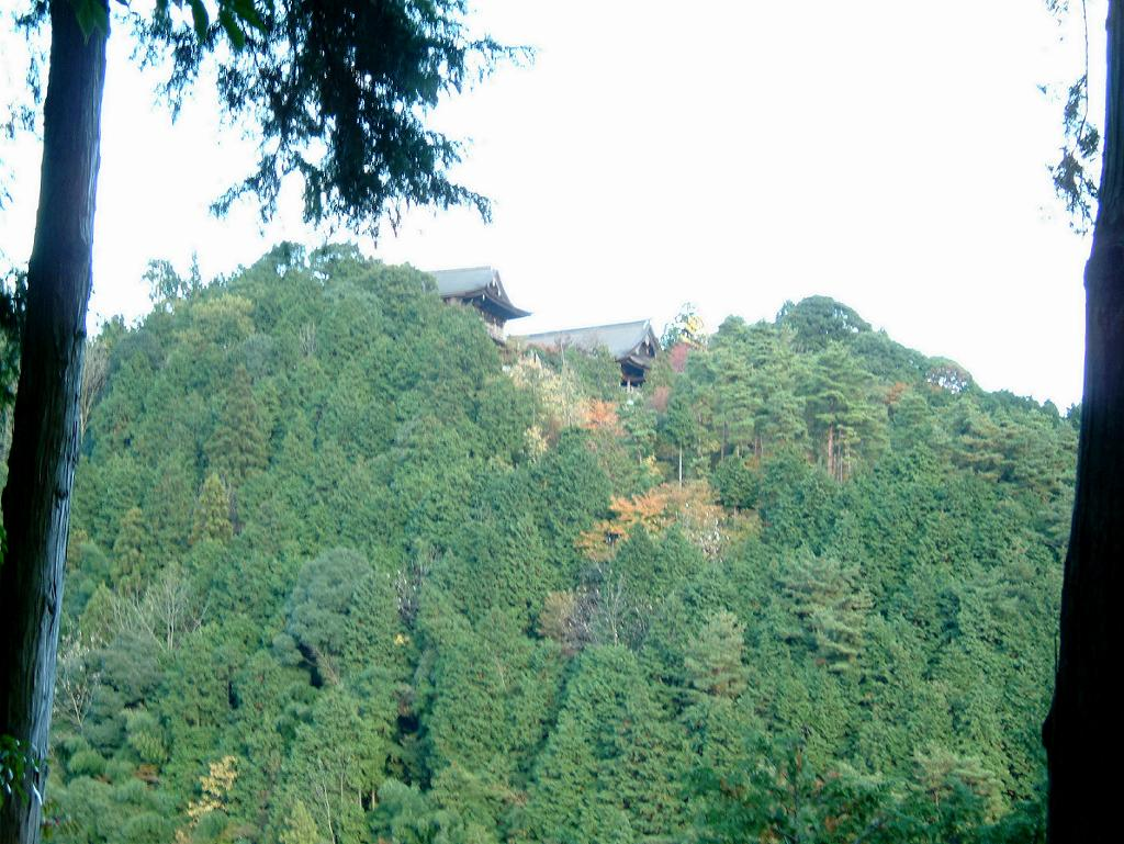 上醍醐の山頂に如意輪堂と開山堂が並ぶ